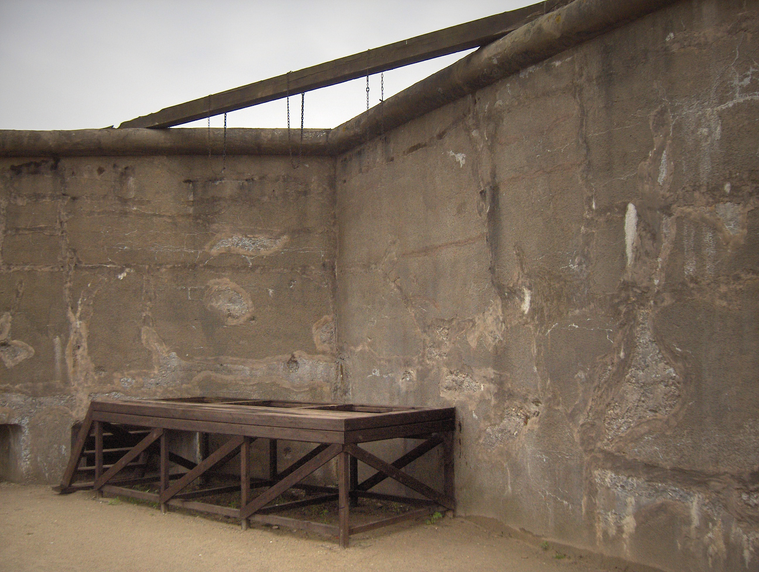 Gallows; Fort van Breendonk, Belgium